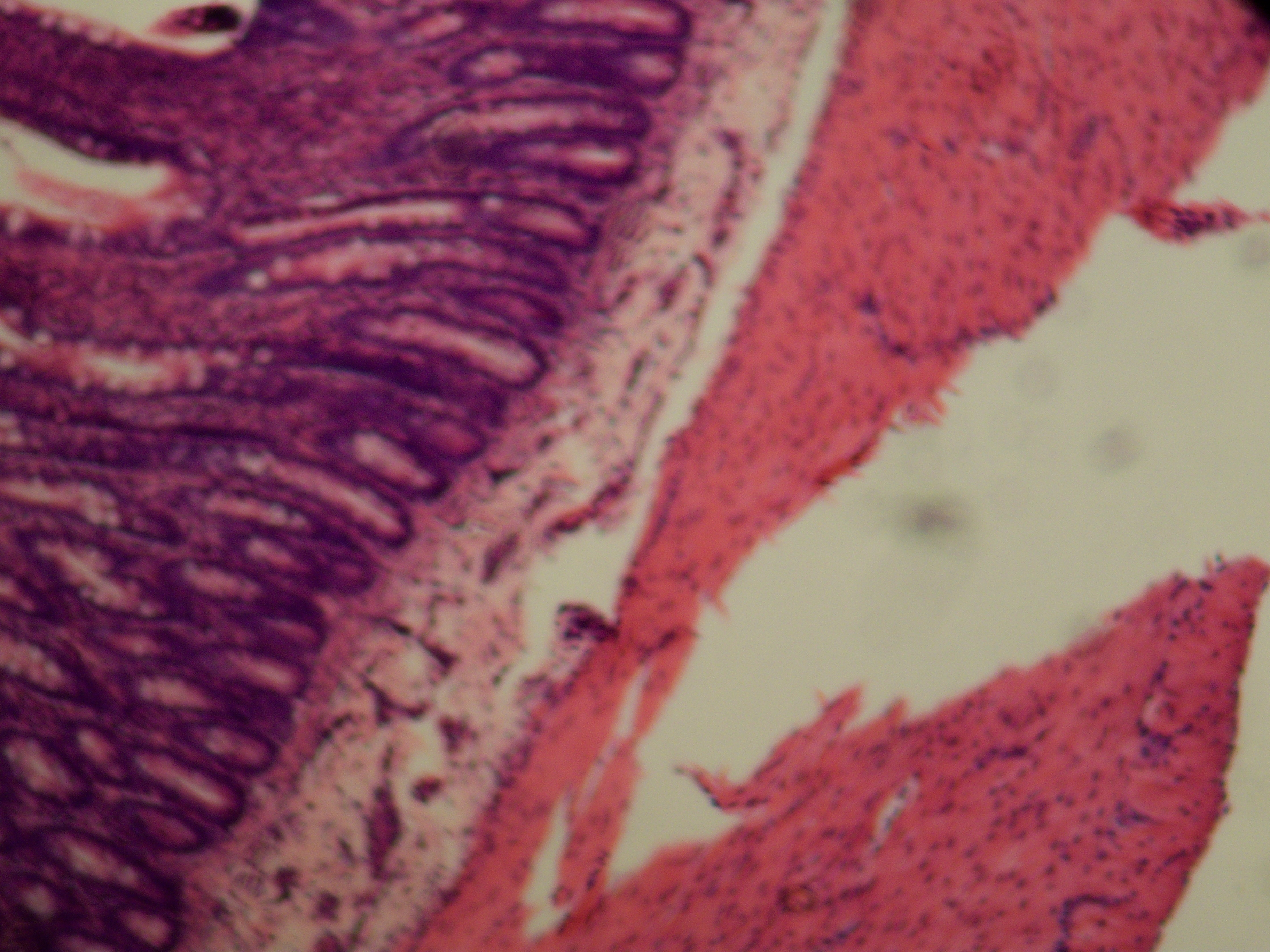 intestino tenue